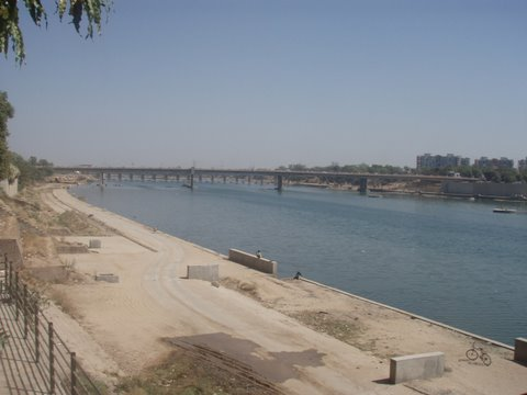 Ahmedabad, Gujrat INDIA